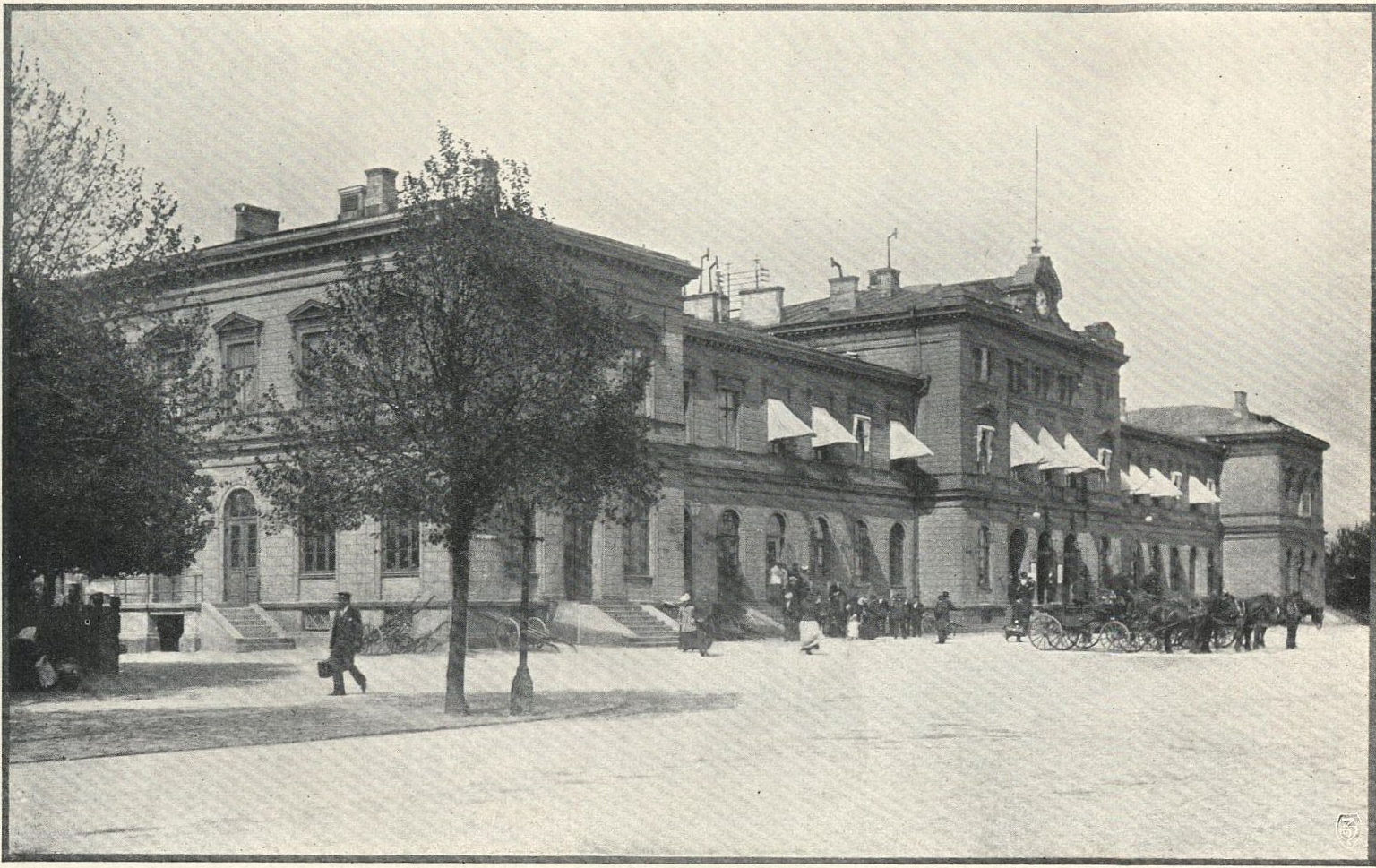 Bergslagsbanans station, Göteborg